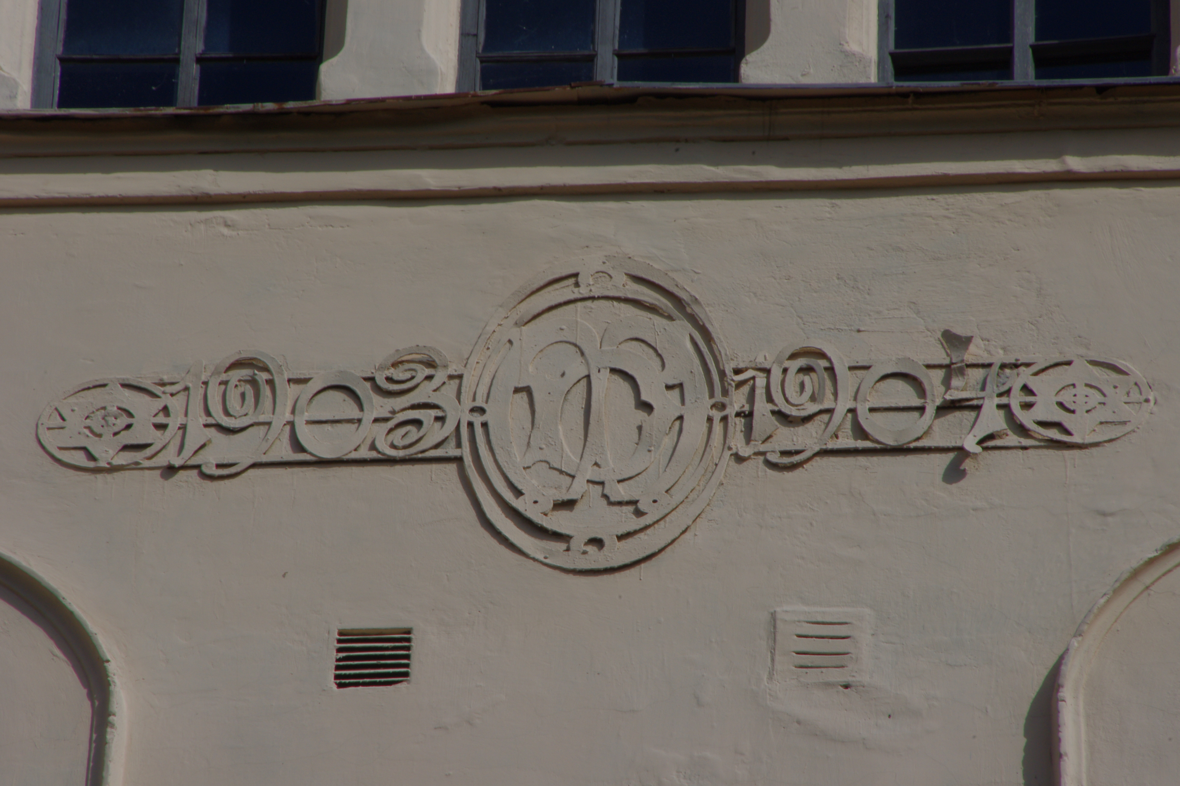 Vyborg, Leningrad Oblast, Russia